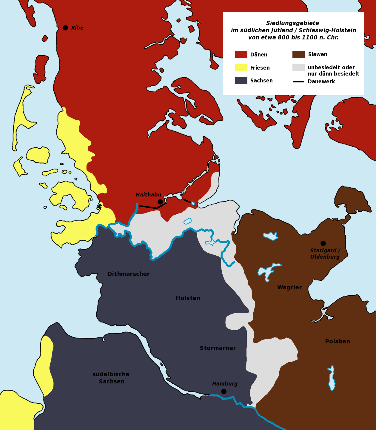 Siedlungsgebiete im südlichen Jütland / Schleswig-Holstein von etwa 800 bis 1100, Quellen: 1) "Siedlungsgebiete vom 9. bis 11. Jahrhundert" in: Historischer Atlas Schleswig-Holstein vom Mittelalter bis 1867, Neumünster 2004. 2) Peter Ilsøe: Nordens Historie, København 1936; Anmerkung: Küstenlinie nur annähernd, Stand etwa frühe Neuzeit (mit Text + Danewerk)